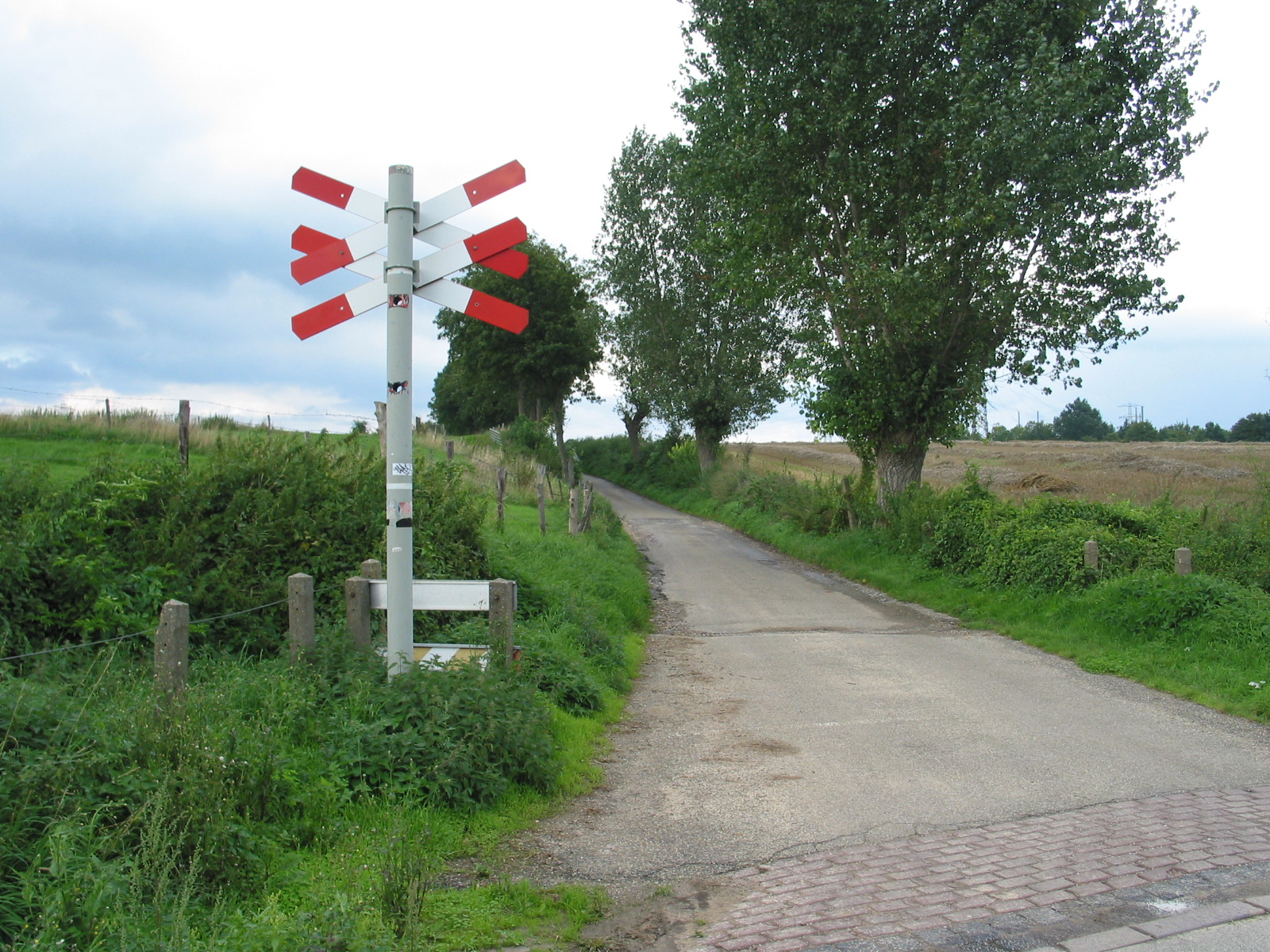 Onbewaakte spoorwegovergang van de miljoenenlijn bij Schoonbron